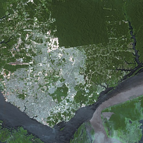 Região Metropolitana de Manaus,brasil.